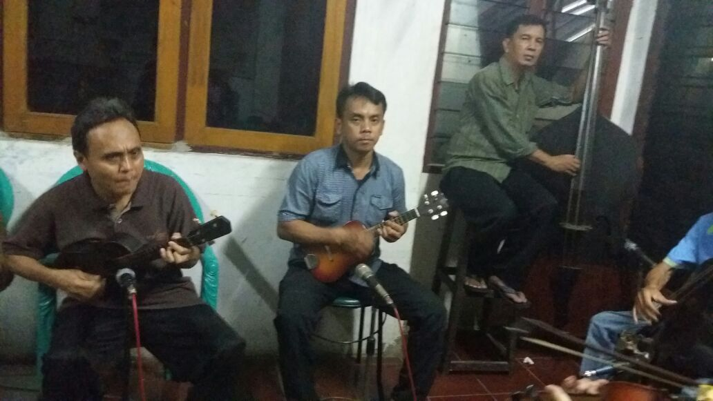 Latihan musik musik keroncong di jakarta pusat